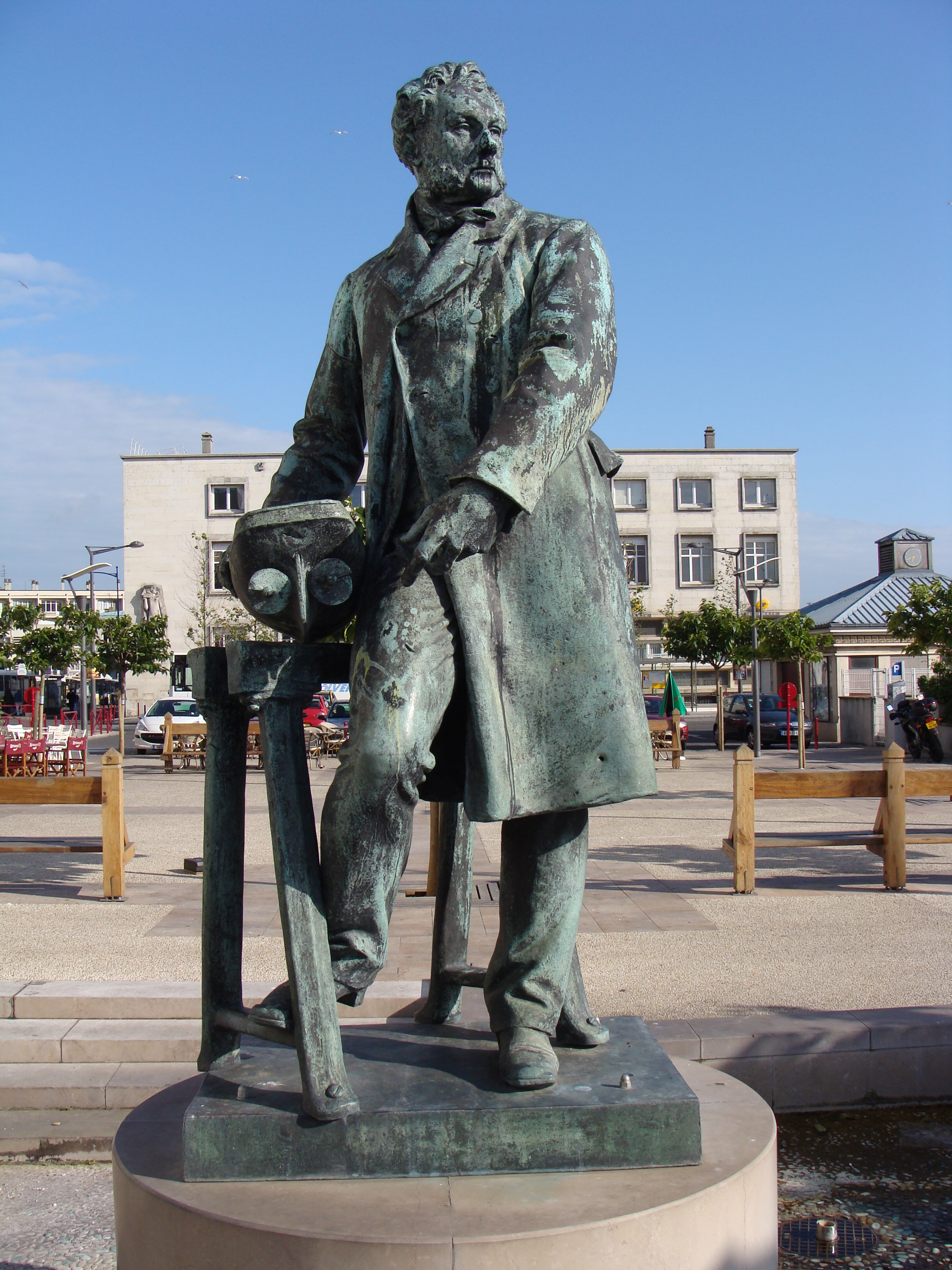 Statue en bronze de Frédéric Sauvage à Boulogne-sur-Mer. Plâtre présenté au Salon de 1880